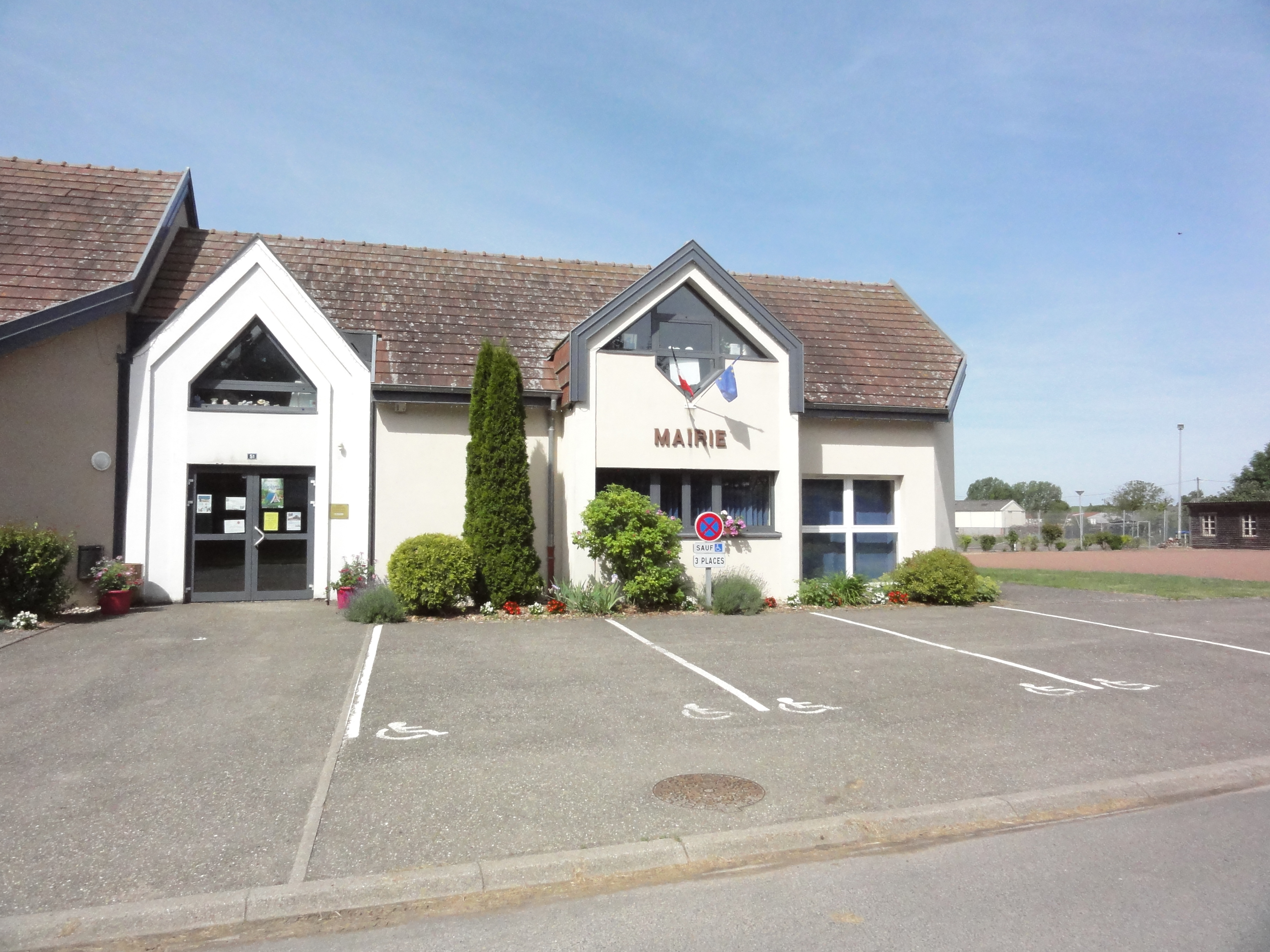 Fribourg (Moselle) mairie